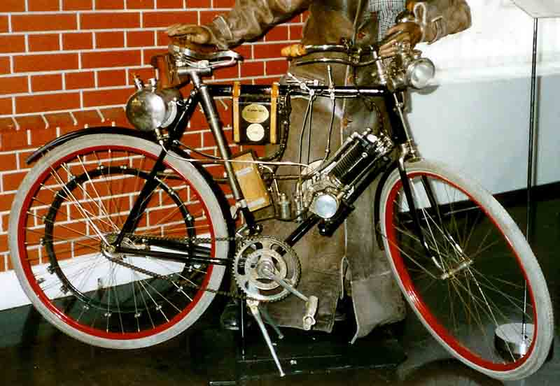 Scania